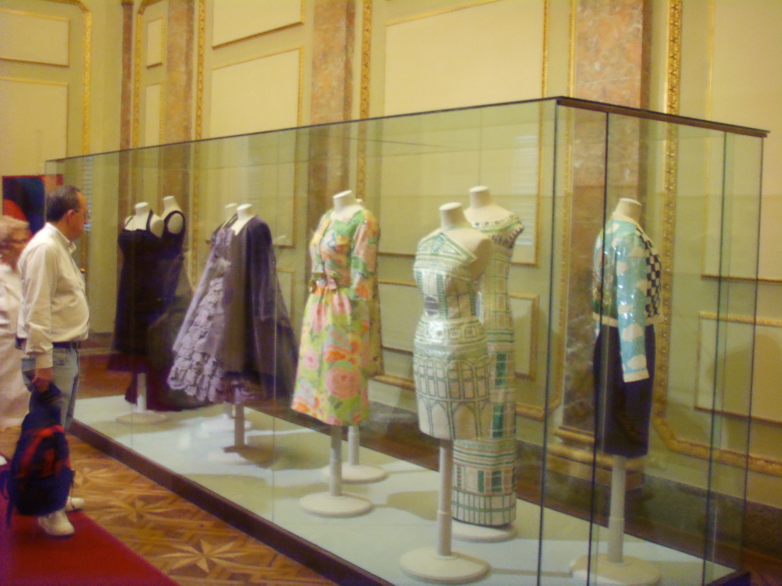 Galleria del costume nella "Palazzina della meridiana" di Palazzo Pitti a Firenze.